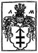 Родавыя гербы XVI i XVII стст. Віленская школа.